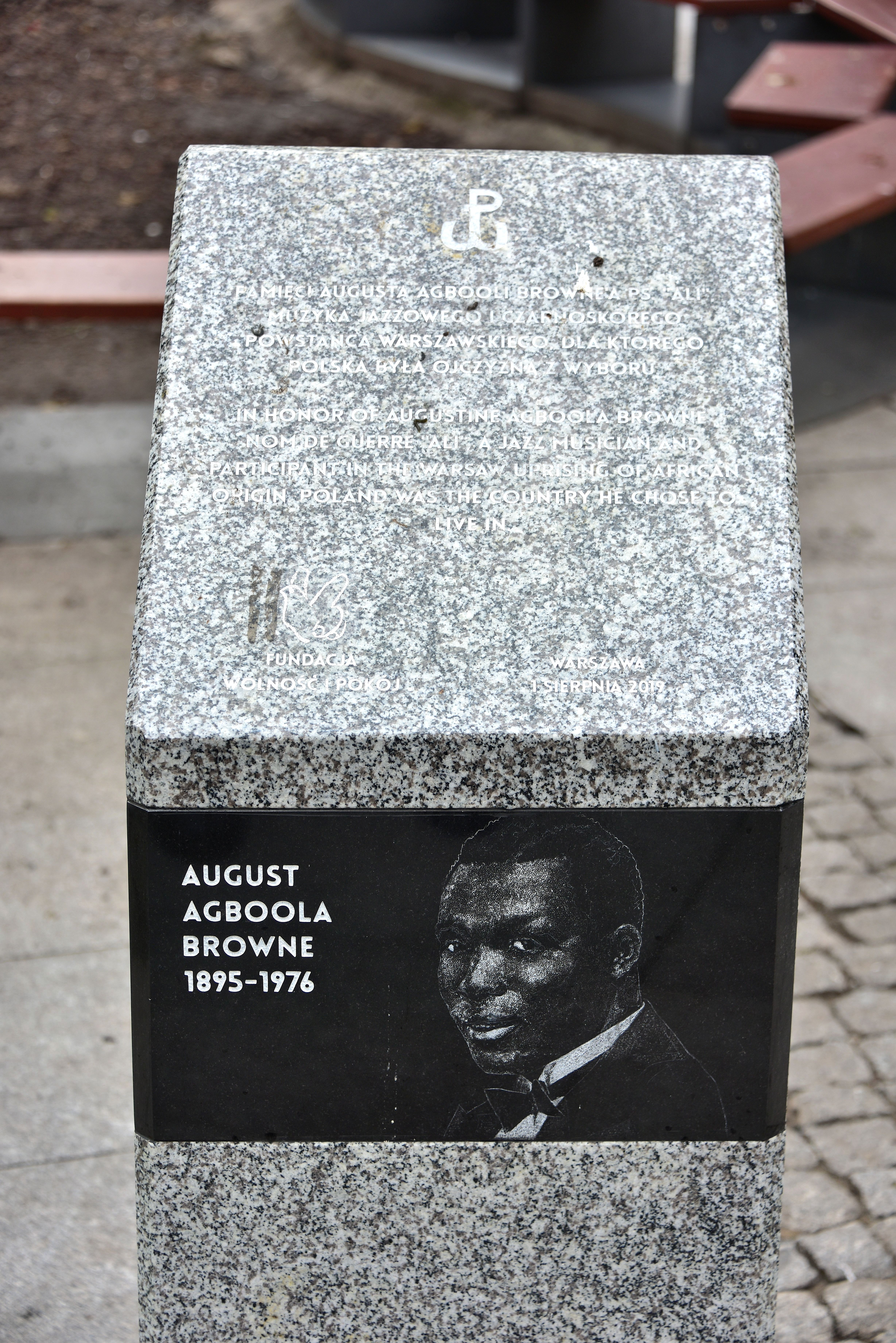 Upamiętnienie Augusta Agboli Browne'a w pasażu Wiecha (róg ul. Chmielnej) Warszawie